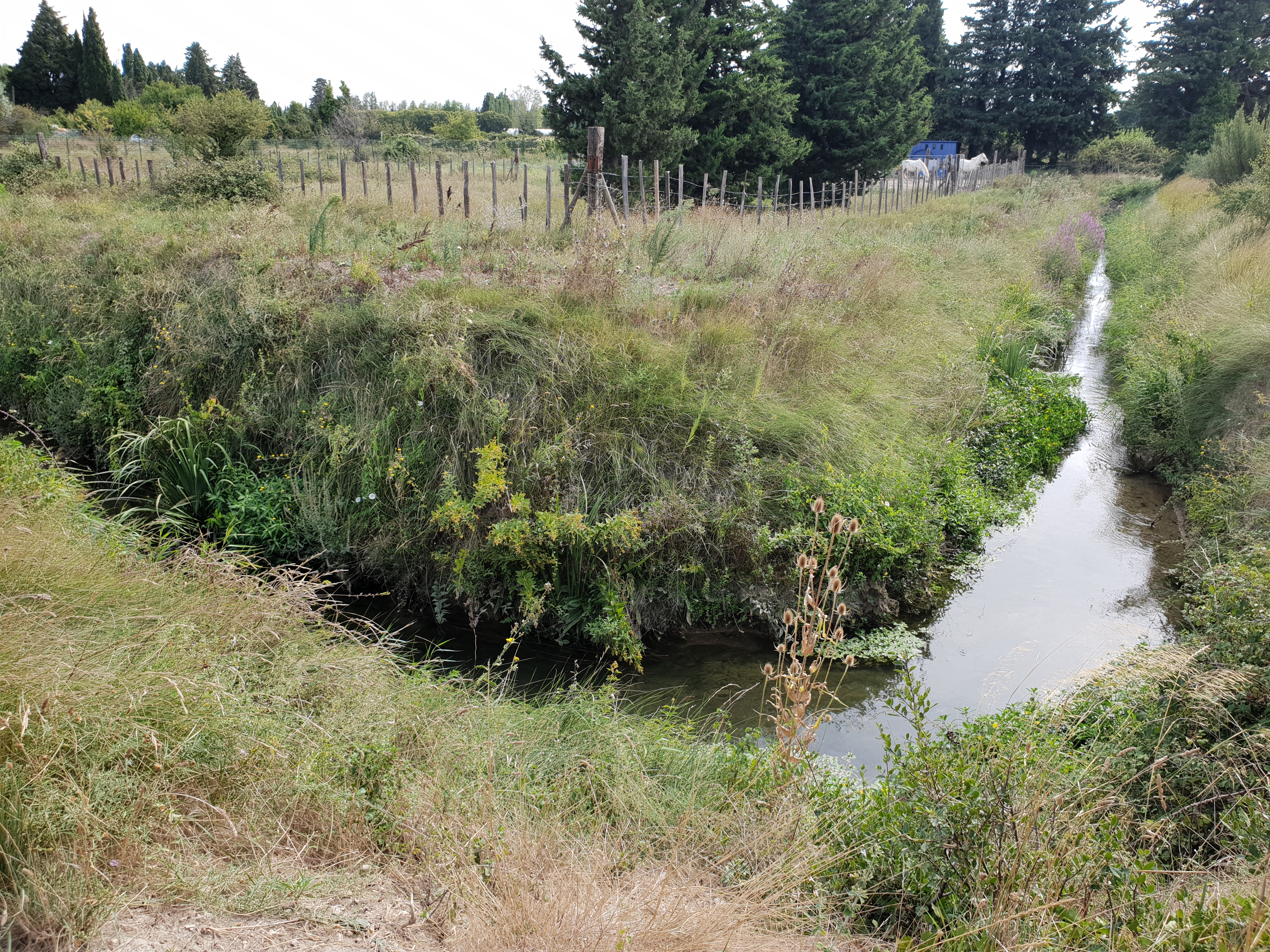 Le Fossé des Lônes au nord du village, tracé orthogonal qui en signe l'artificialité